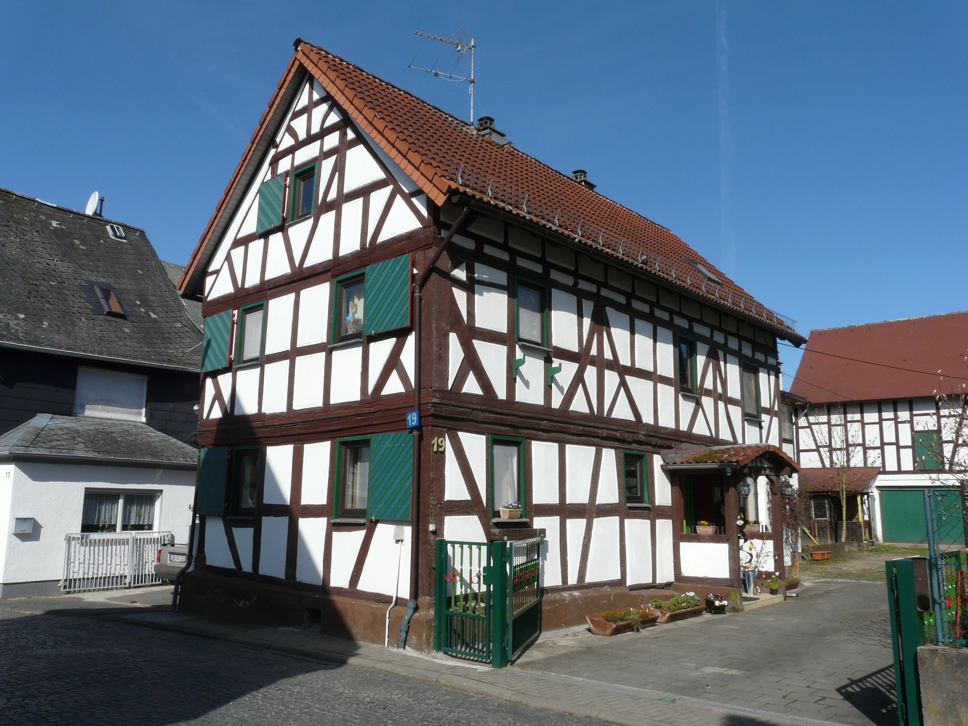 Fachwerkhaus in Schöffengrund-Laufdorf, Ringstraße 19